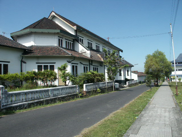 Muntilan kerk